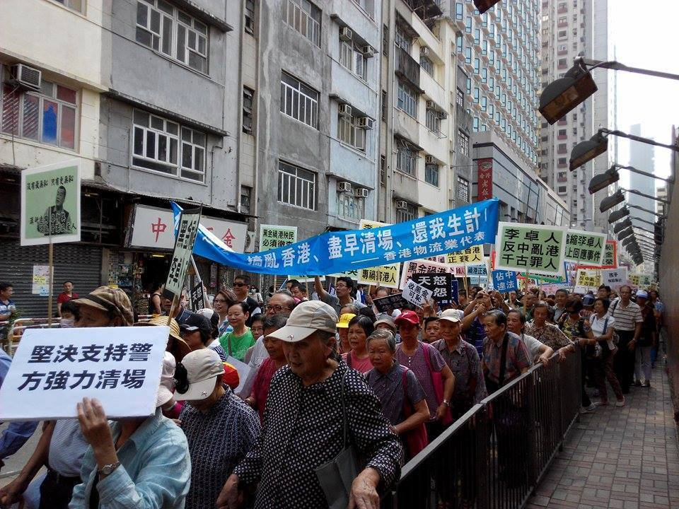 遊行中代表香港物流業的老人家